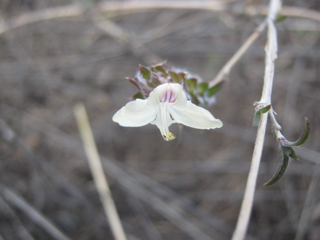 Tetramerium nervosum